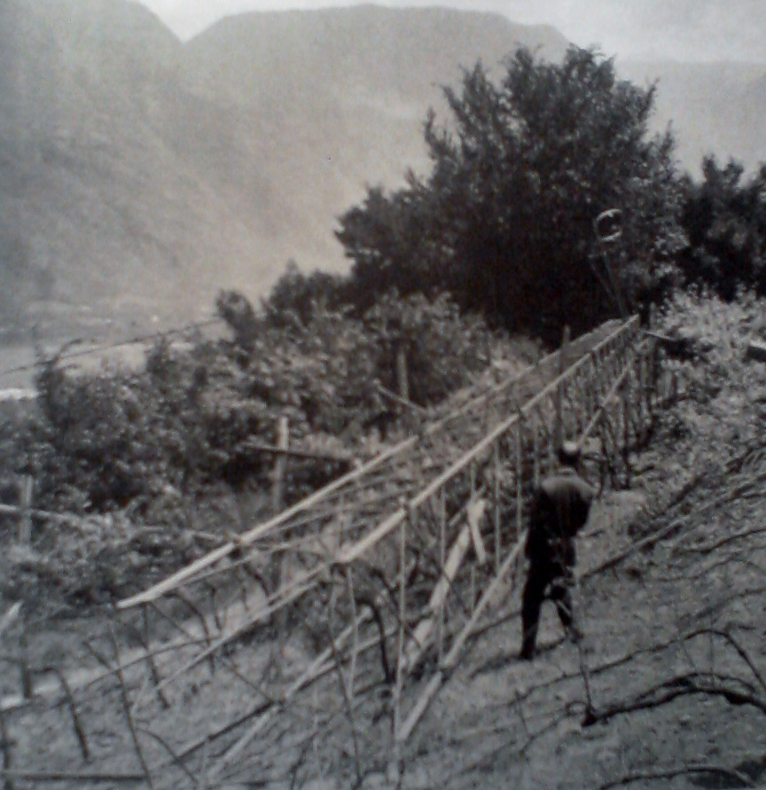 Feuer Nacht giugno 1961